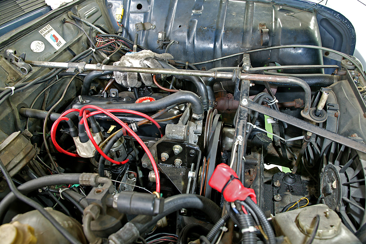 Renault 4 engine bay